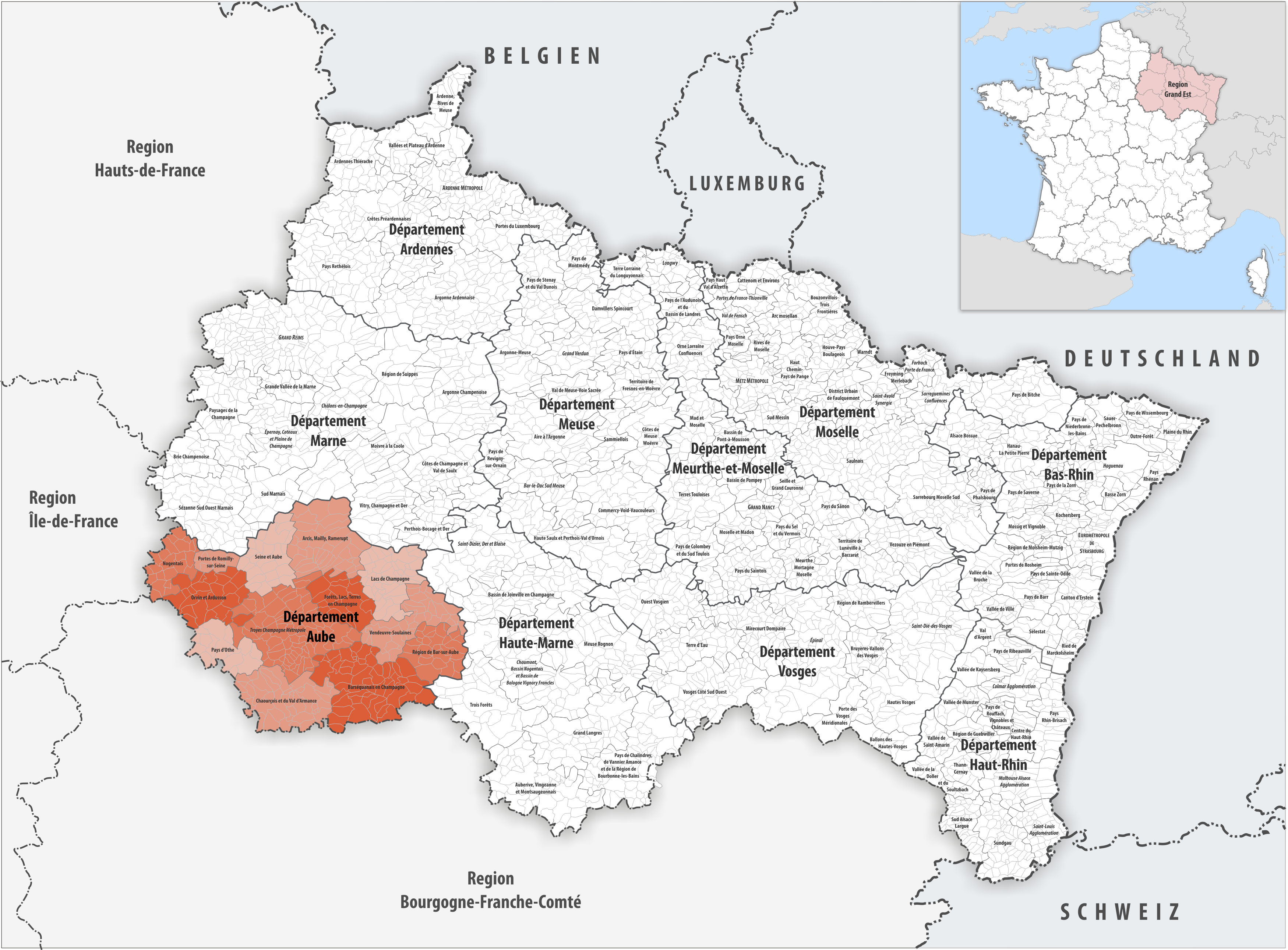 Gemeindeverbände im Département Aube